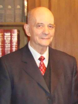 Jorge Martínez Busch, almirante y senador chileno.